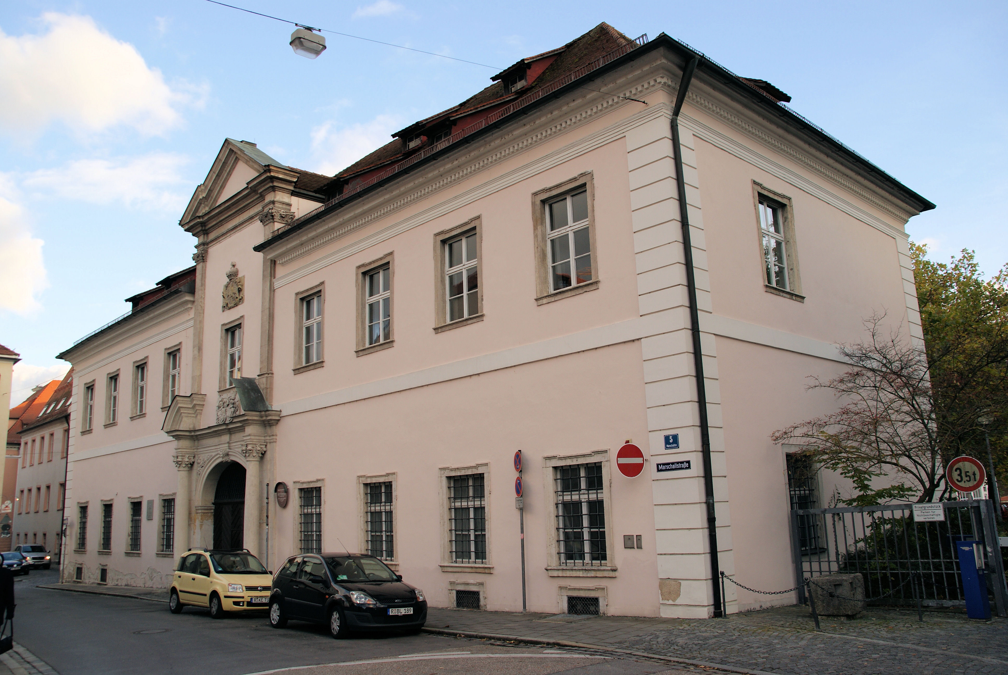 Regierung der Oberpfalz, ehem. Neue Deutschordenskommende (Neues Deutsches Haus), zweiflügeliger und zweigeschossiger Walmdachbau in Ecklage, Portalrisalit mit Werksteingliederungen in Sandstein, spätbarock, 1720/26 von Franz Keller; 1834-1934 Bleistiftfabrik Johann Jakob Rehbach.This is a photograph of an architectural monument.